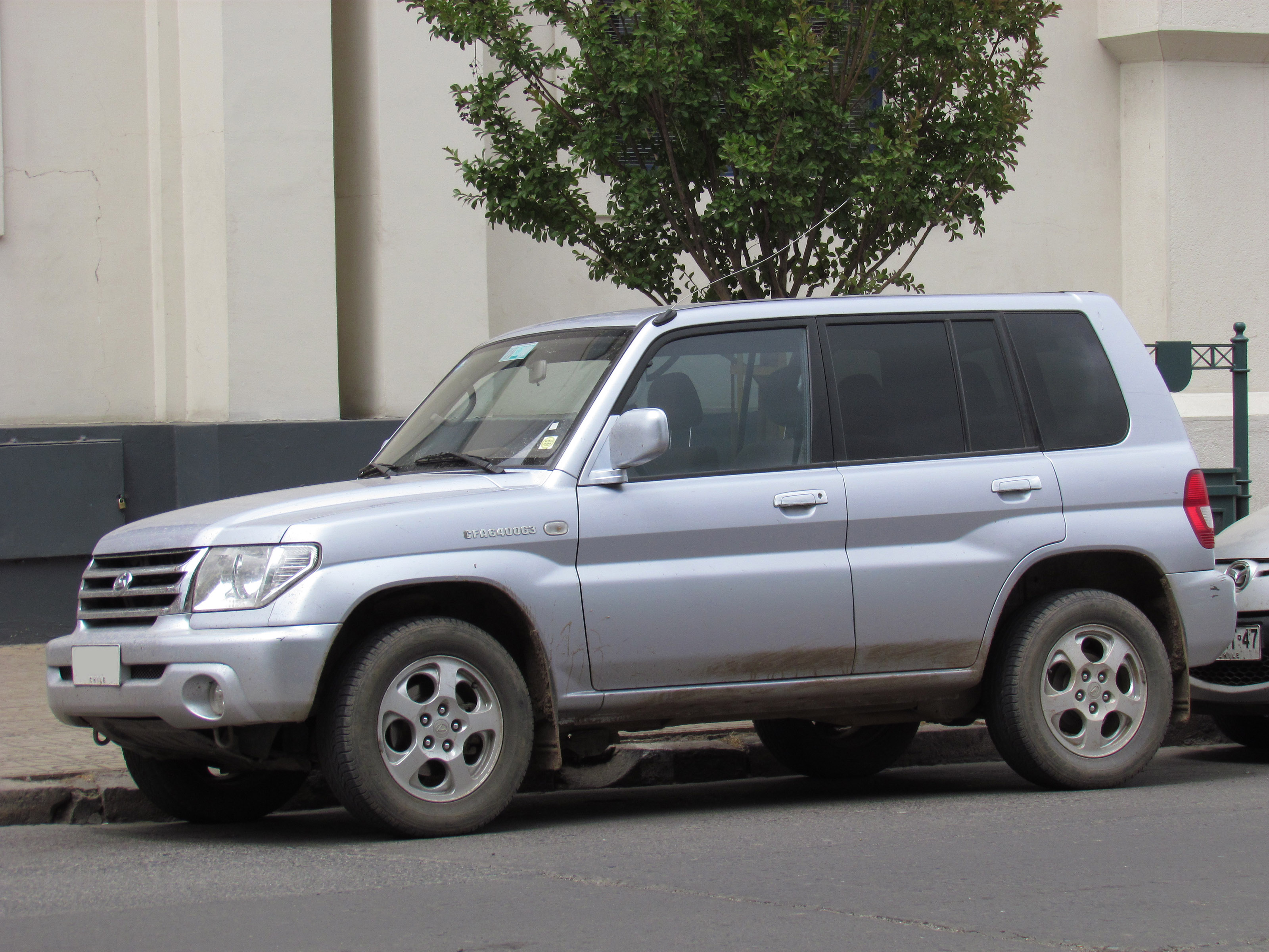 Changfeng Liebao Feiteng GFA6400G3 2009